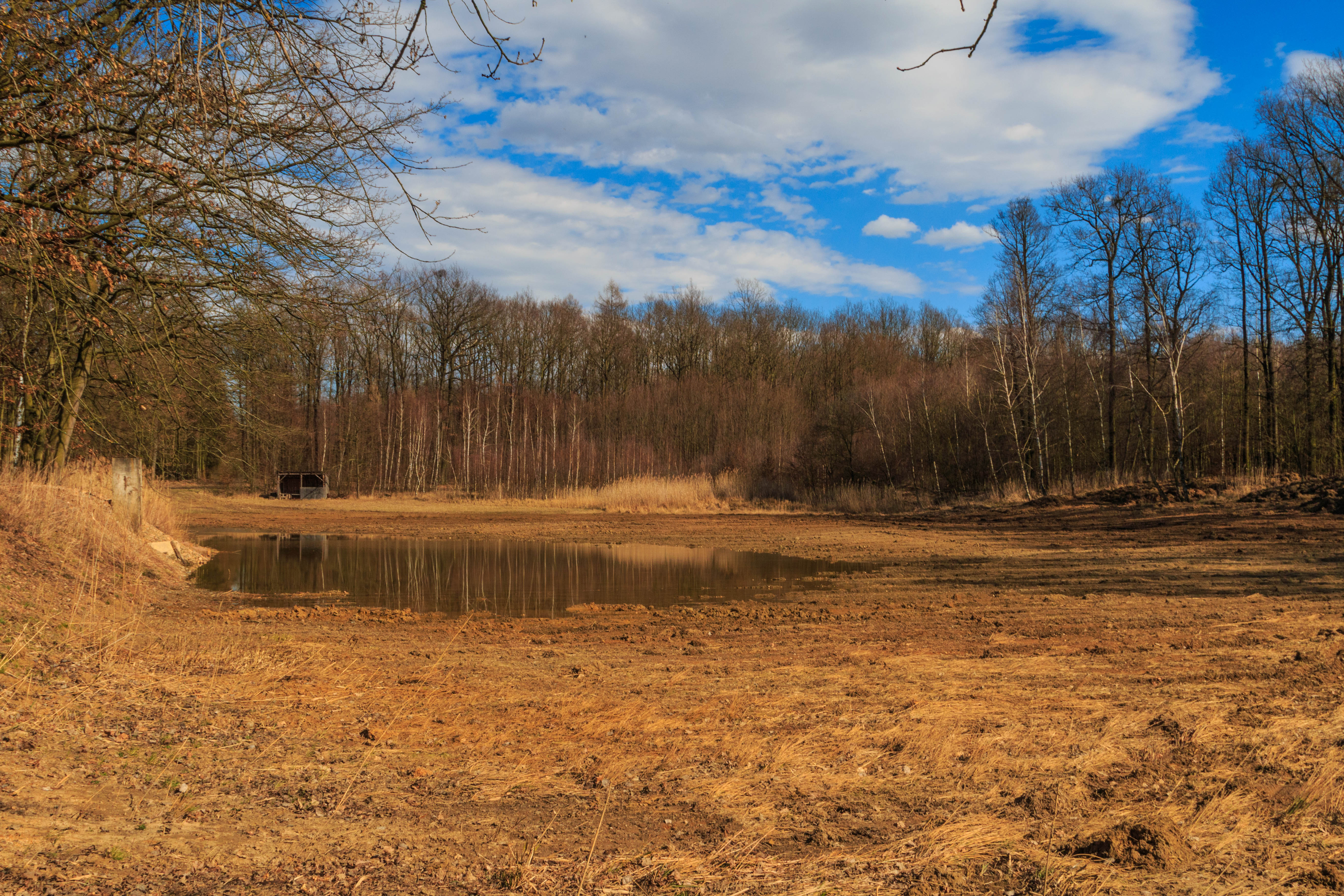 lesní rybník Lhotáček Project: Vodstvo.